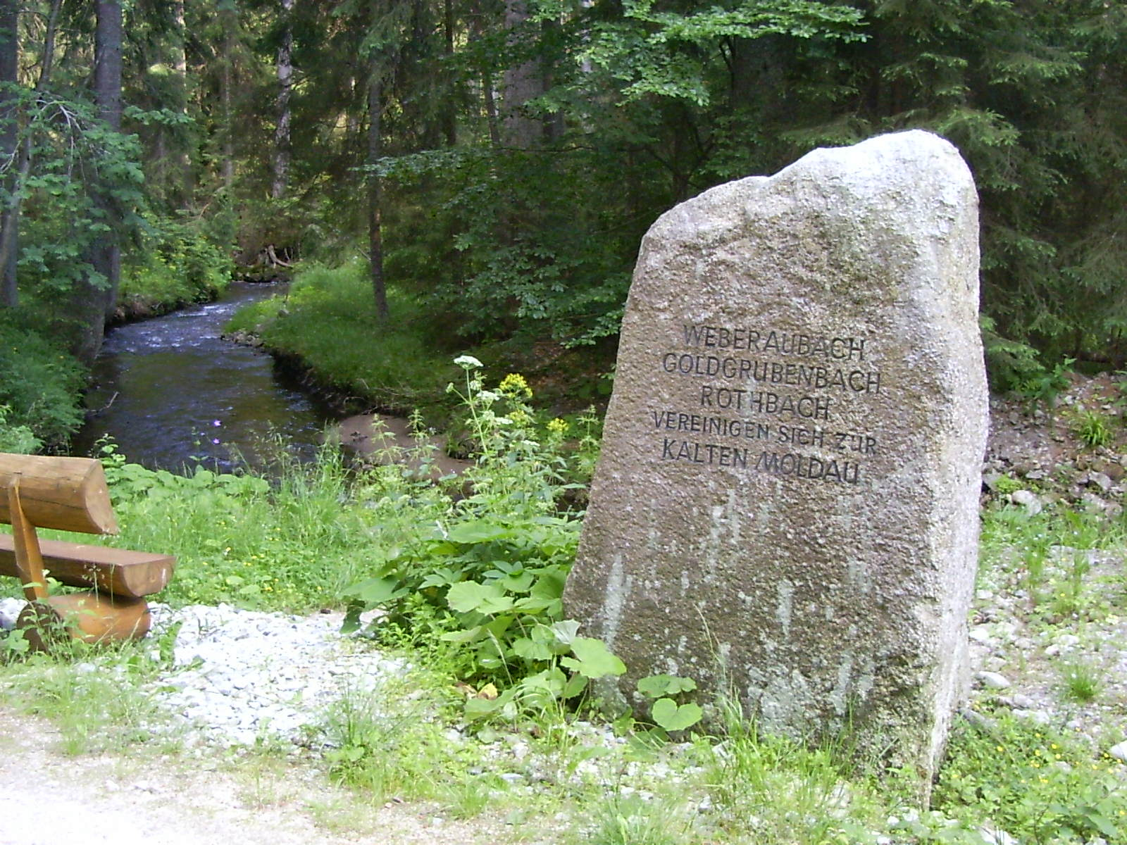 Der Anfangsstein der Kalten Moldau, Landkreis Freyung-Grafenau, Bayern